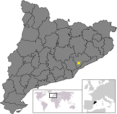 Localització de Granollers. Location of Granollers in Catalonia.